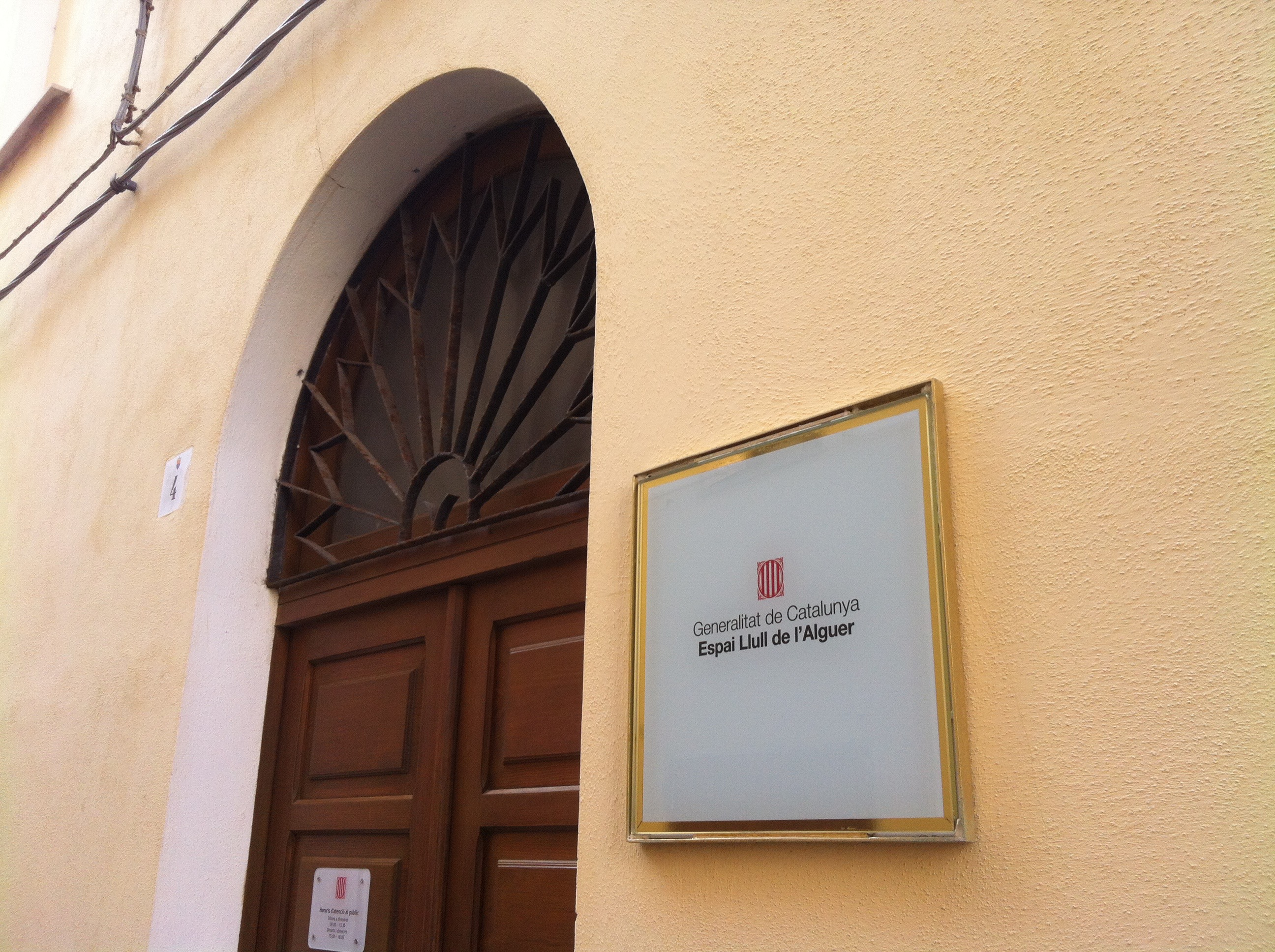 Presentació Bibliowikis a L'Alguer